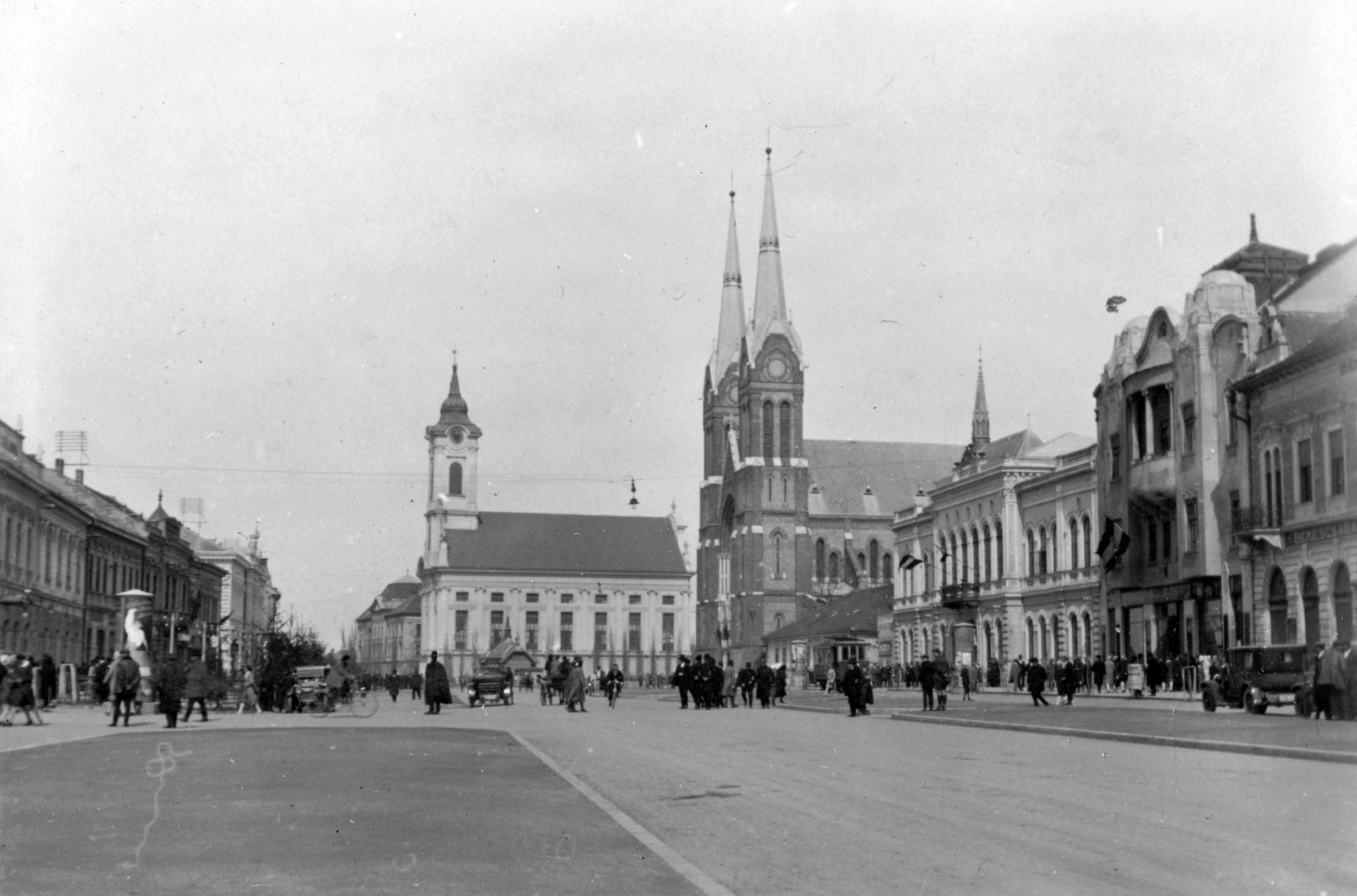 Szent István tér, szemben az Evangélikus nagytemplom, tőle jobbra a Páduai Szent Antal római katolikus templom és a Városháza. Location: Hungary, Békéscsaba Tags: street view, genre painting, automobile, coach, bicycle, ad pillar, narrow-gauge railway, architecture, poster Title: Szent István tér, szemben az Evangélikus nagytemplom, tőle jobbra a Páduai Szent Antal római katolikus templom és a Városháza.